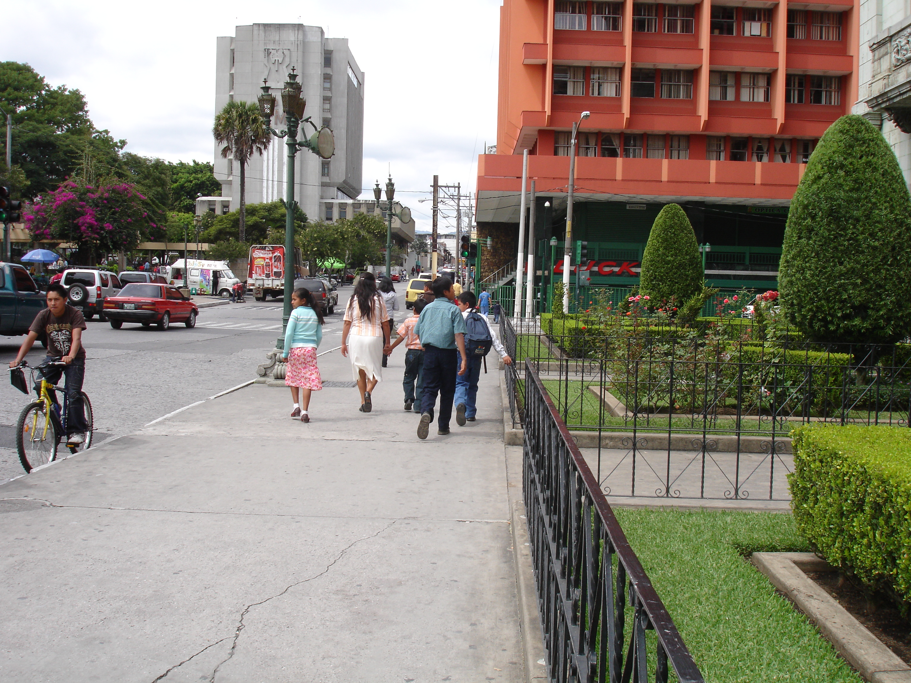 Personas caminando en zona 1